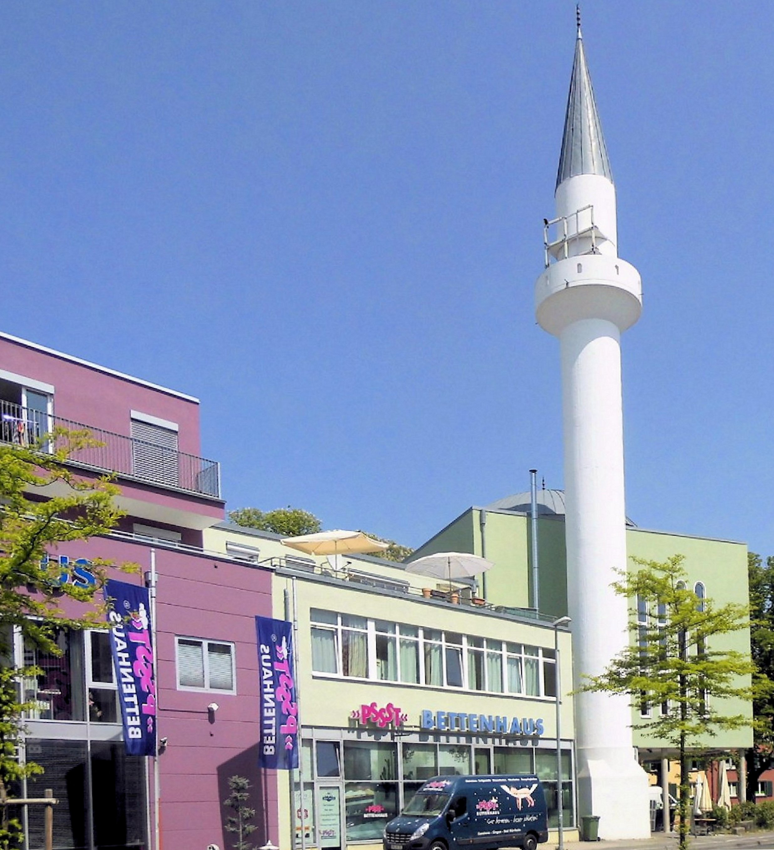 Mevlana-Moschee in Konstanz